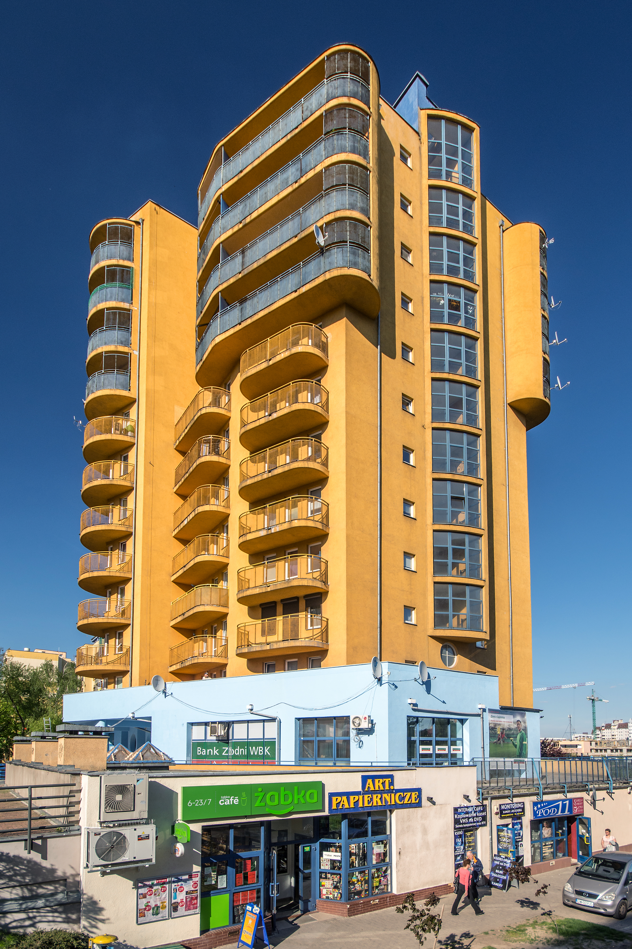 Drzewieckiego, Osiedle Kosmonautów, Gądów Mały, Wrocław